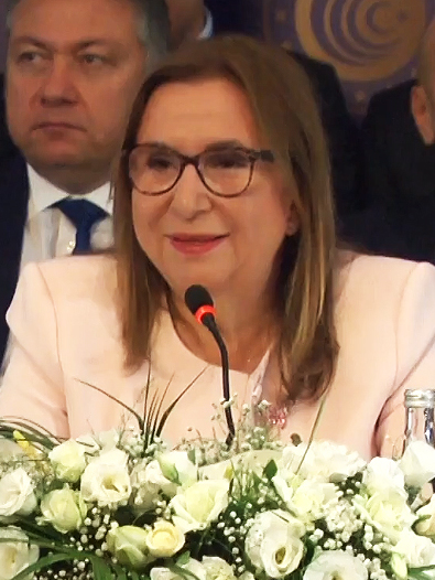 Türkiye Ticaret Bakanı